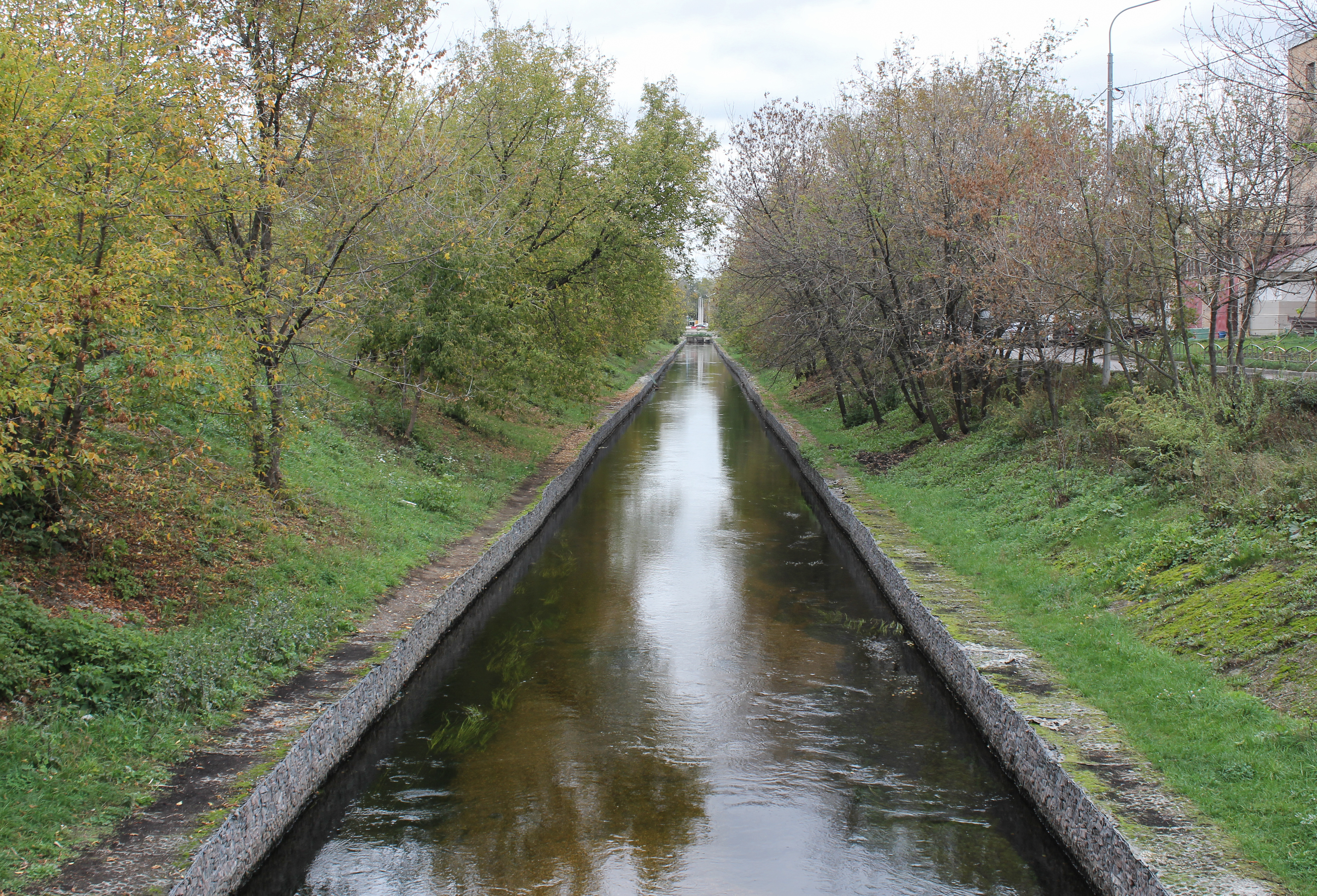 Головинский канал